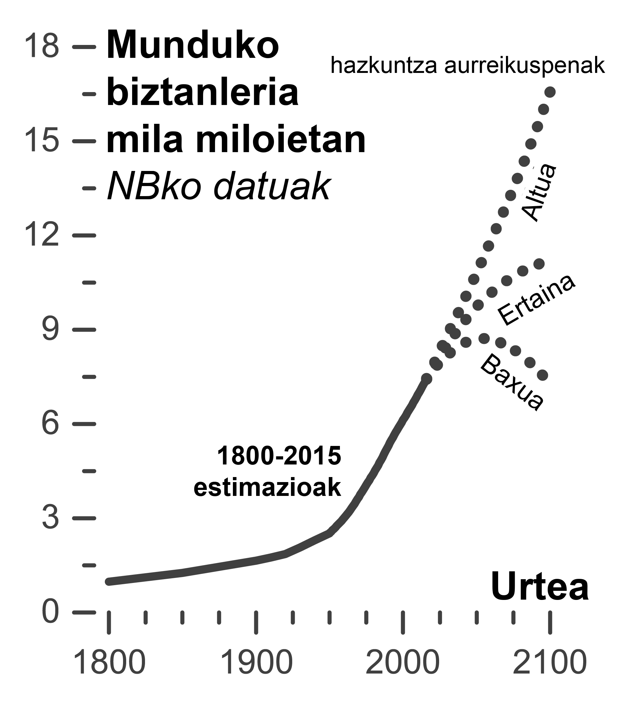 Munduko biztanleria eta proiekzioak